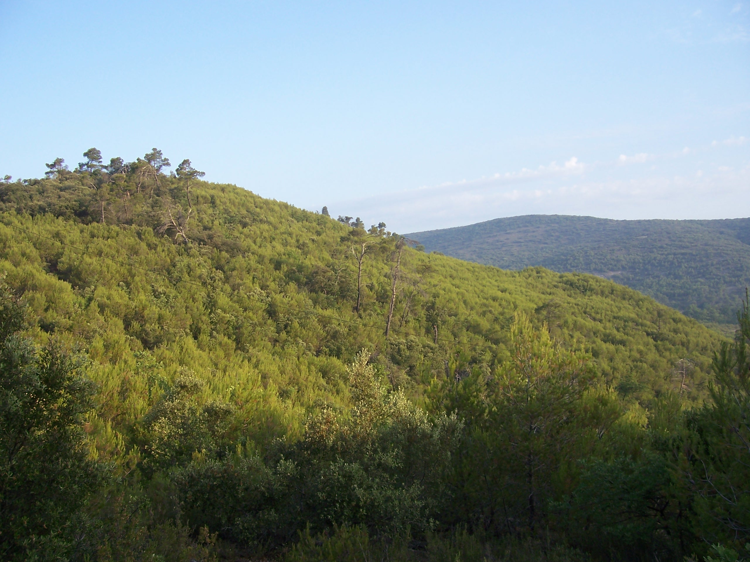 Beaumont